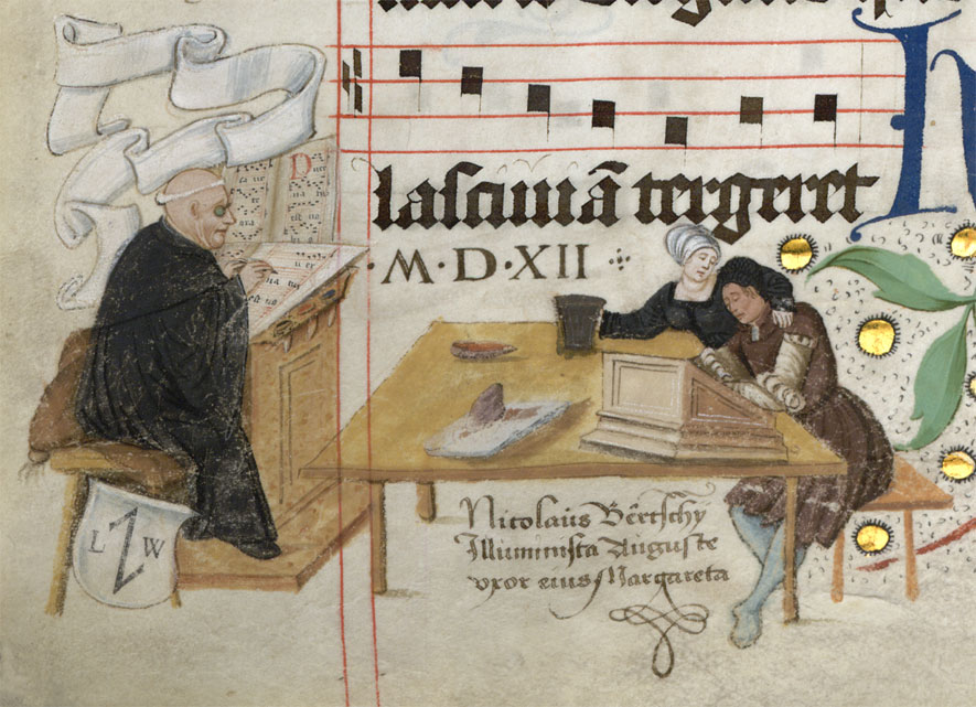 Leonhard Wagner OSB und Nikolaus Bertschi mit Frau. Graduale (Lorcher Chorbuch), Lorch 1511-12, Würtembergische Landesbibliothek Stuttgart Cod. mus. I 2° 65, fol. 236v (Ausschnitt).